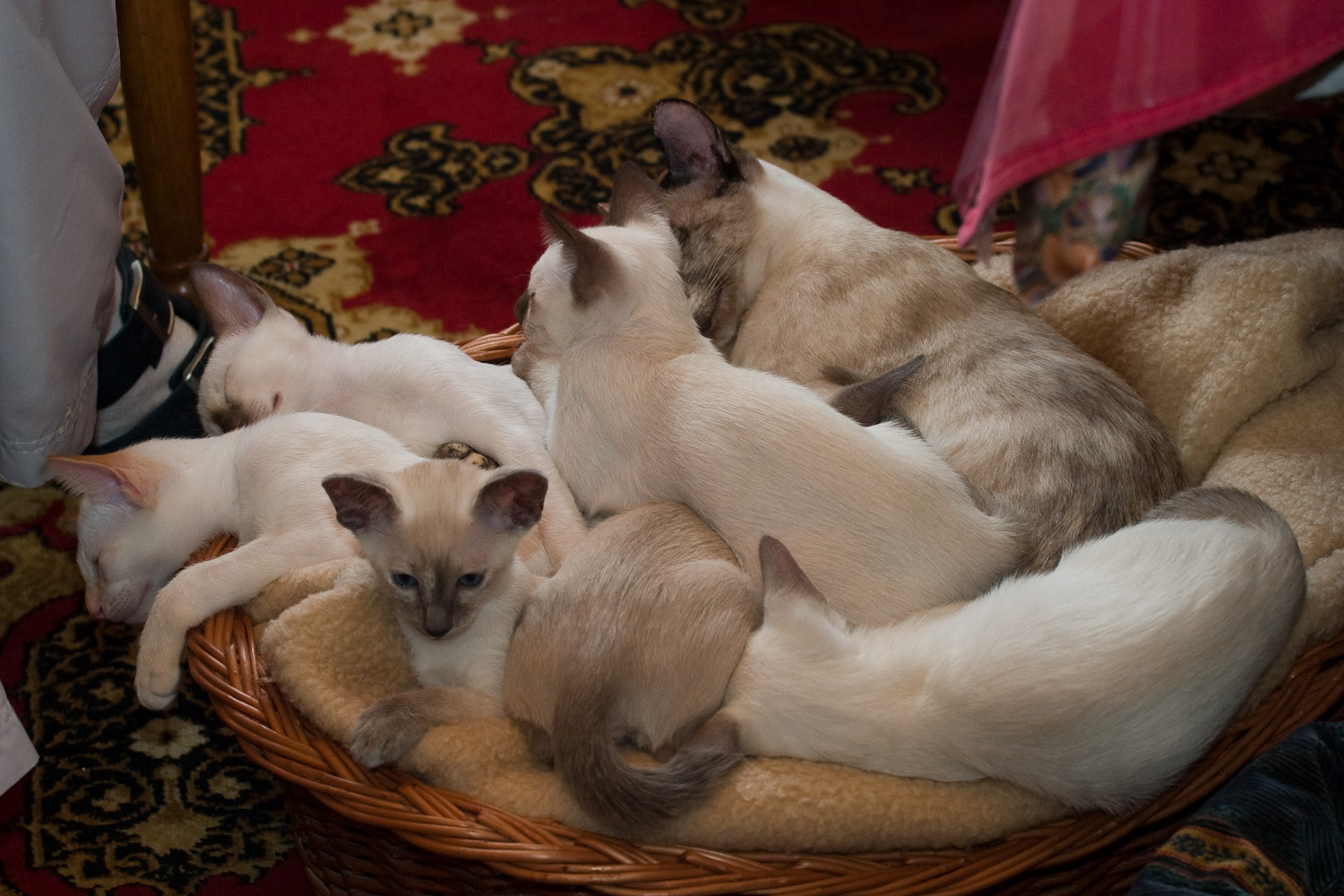 Siamkatzenmutter mit ihrem Wurf